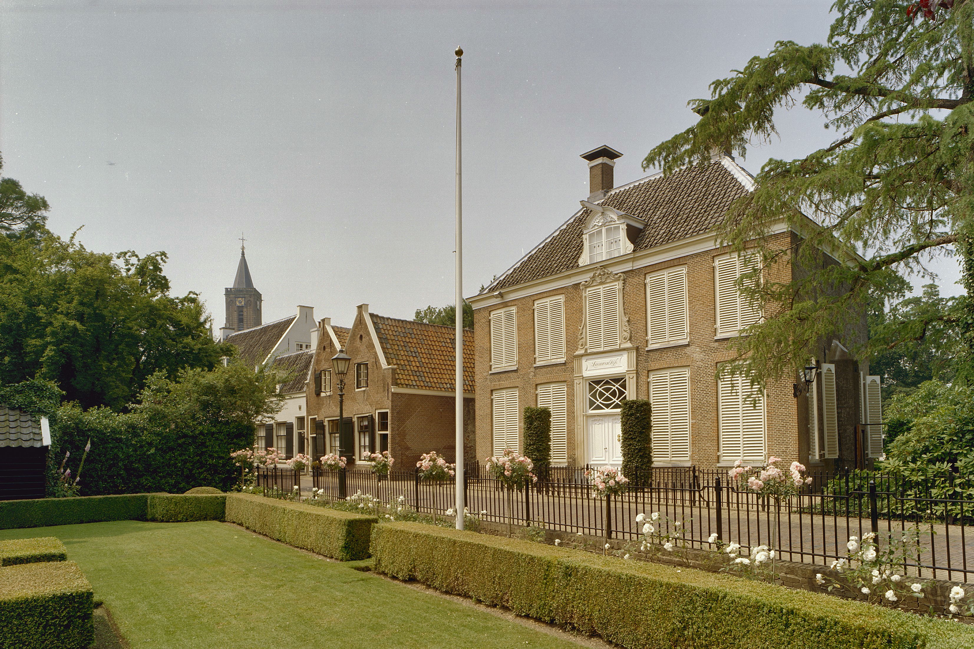 Huis Leeuwendijk: Overzicht voorgevel